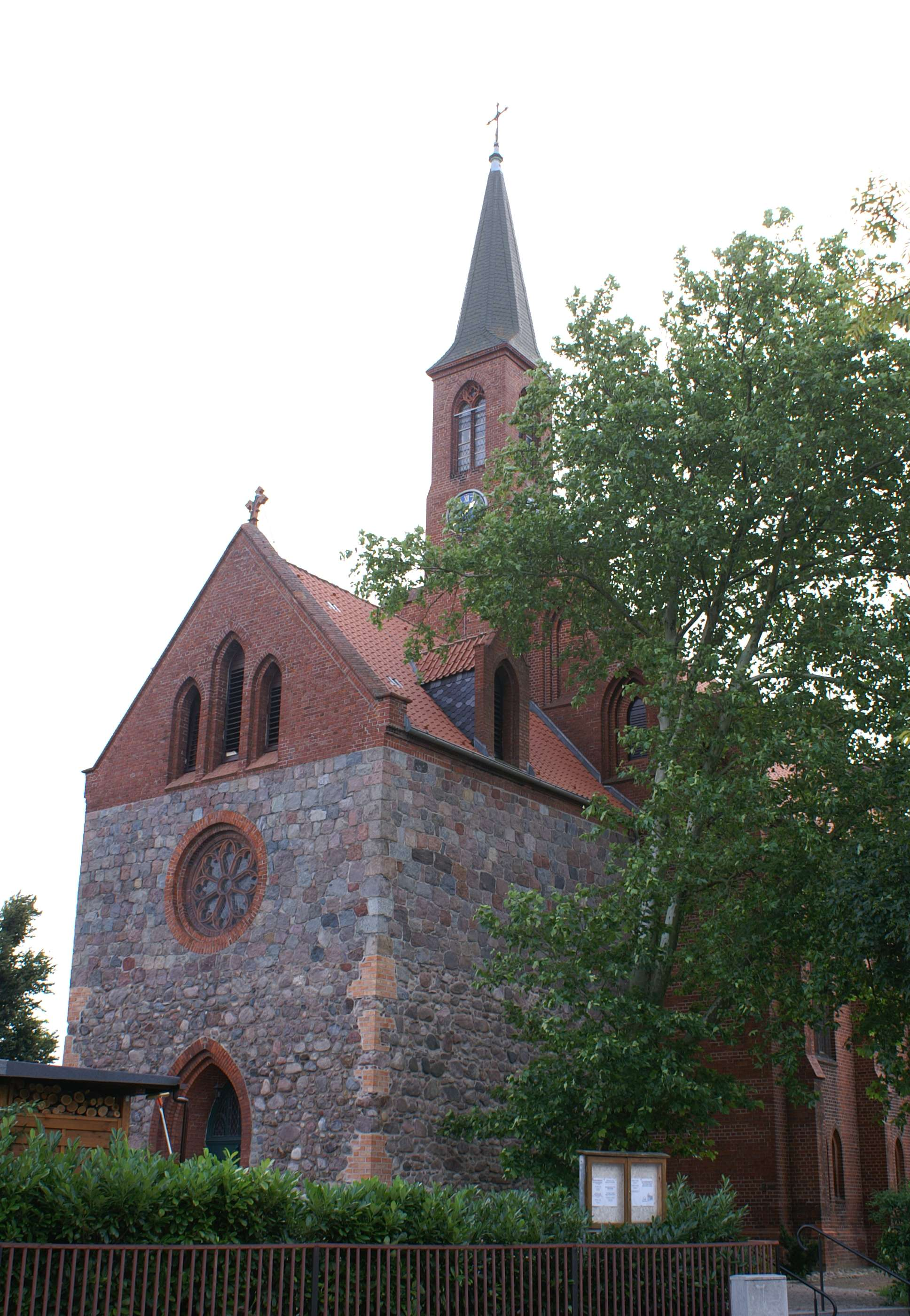 Jarmen - Landkreis Demmin - Kirche Südwestseite